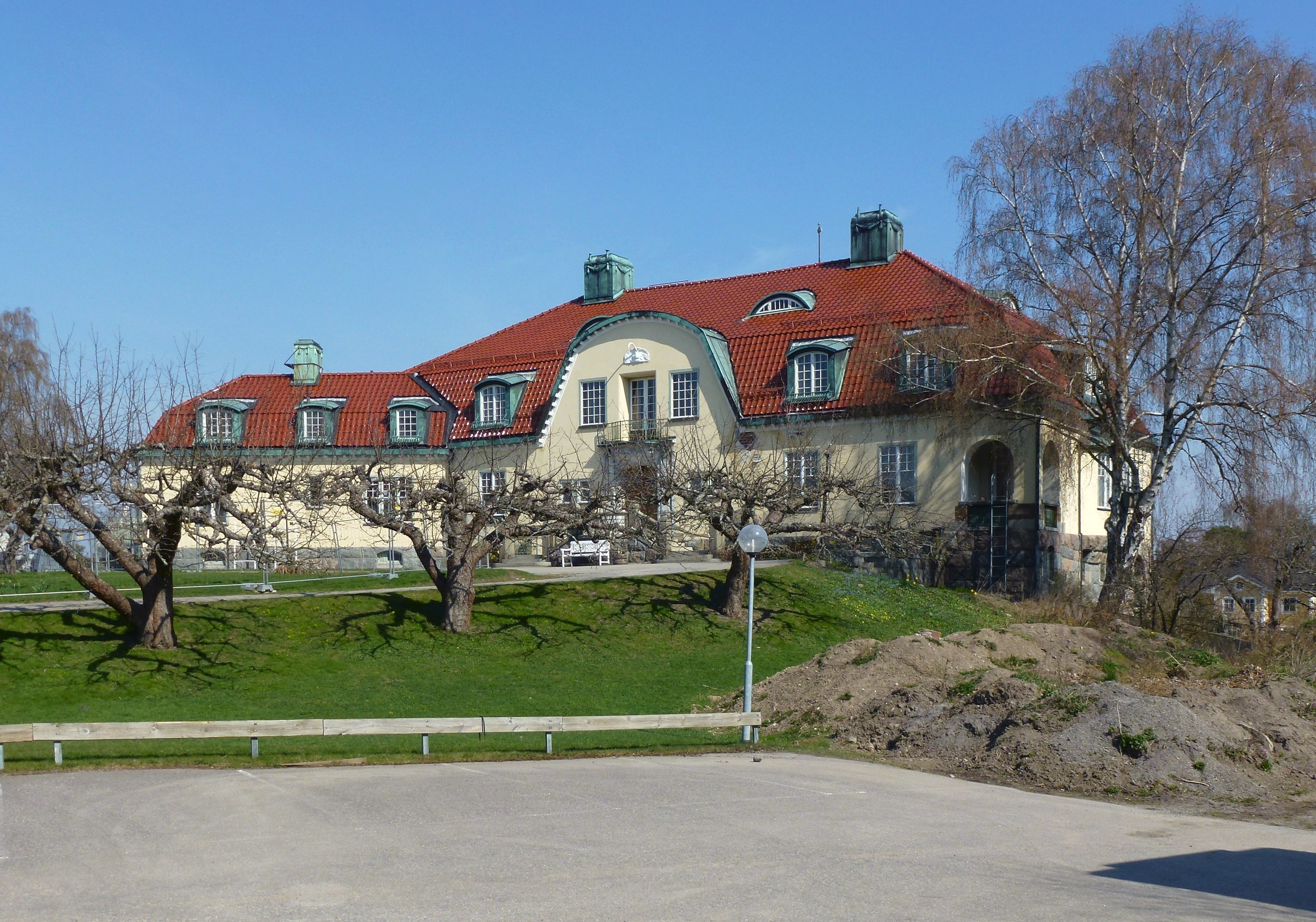 Erstagården, Otto Neumüllers villa byggd 1906, arkitekt Edvard Bernhard